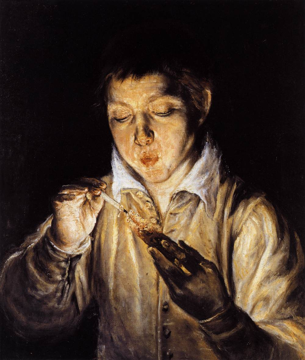 El soplón di El Greco è un quadro (olio su tela, cm 60,5 x 50,5) che si trova a Napoli nel Museo di Capodimonte (inv. Q 192), facente parte della Collezione Farnese.